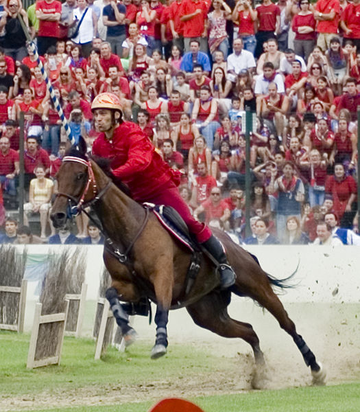 Palio del Niballo Faenza Italie